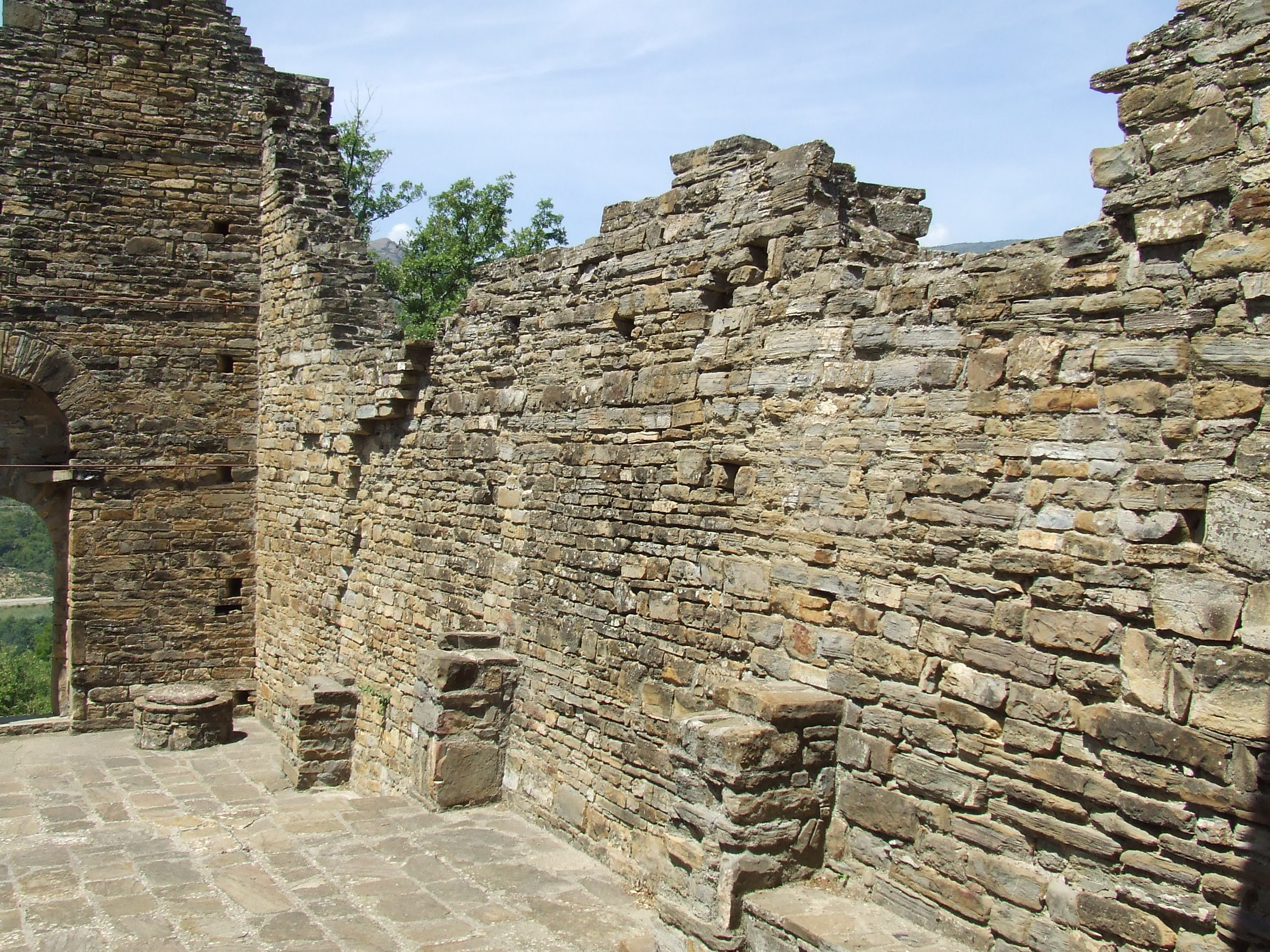 Mur septentrional de Sant Miquel del Pui Vell (la Pobla de Segur, Pallars Jussà)